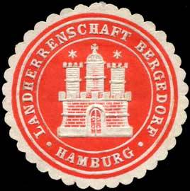 Sealing stamp Title: Landherrenschaft Bergedorf - Hamburg Description: rot, weiß, geprägt Place: Hamburg size: 4 cm